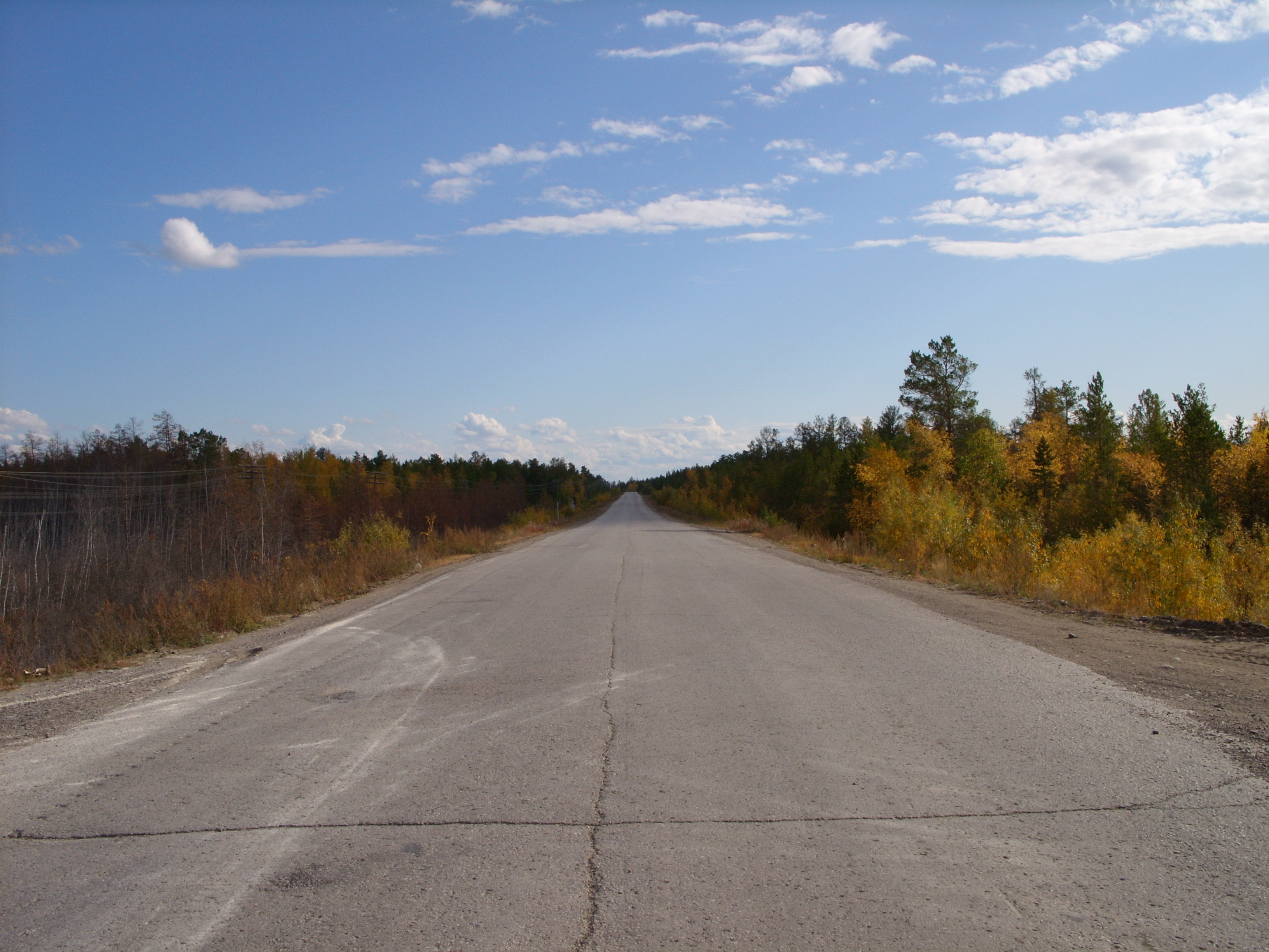 Федеральная автодорога "Лена" в окрестностях Нижнего Бестяха. Вид на юг